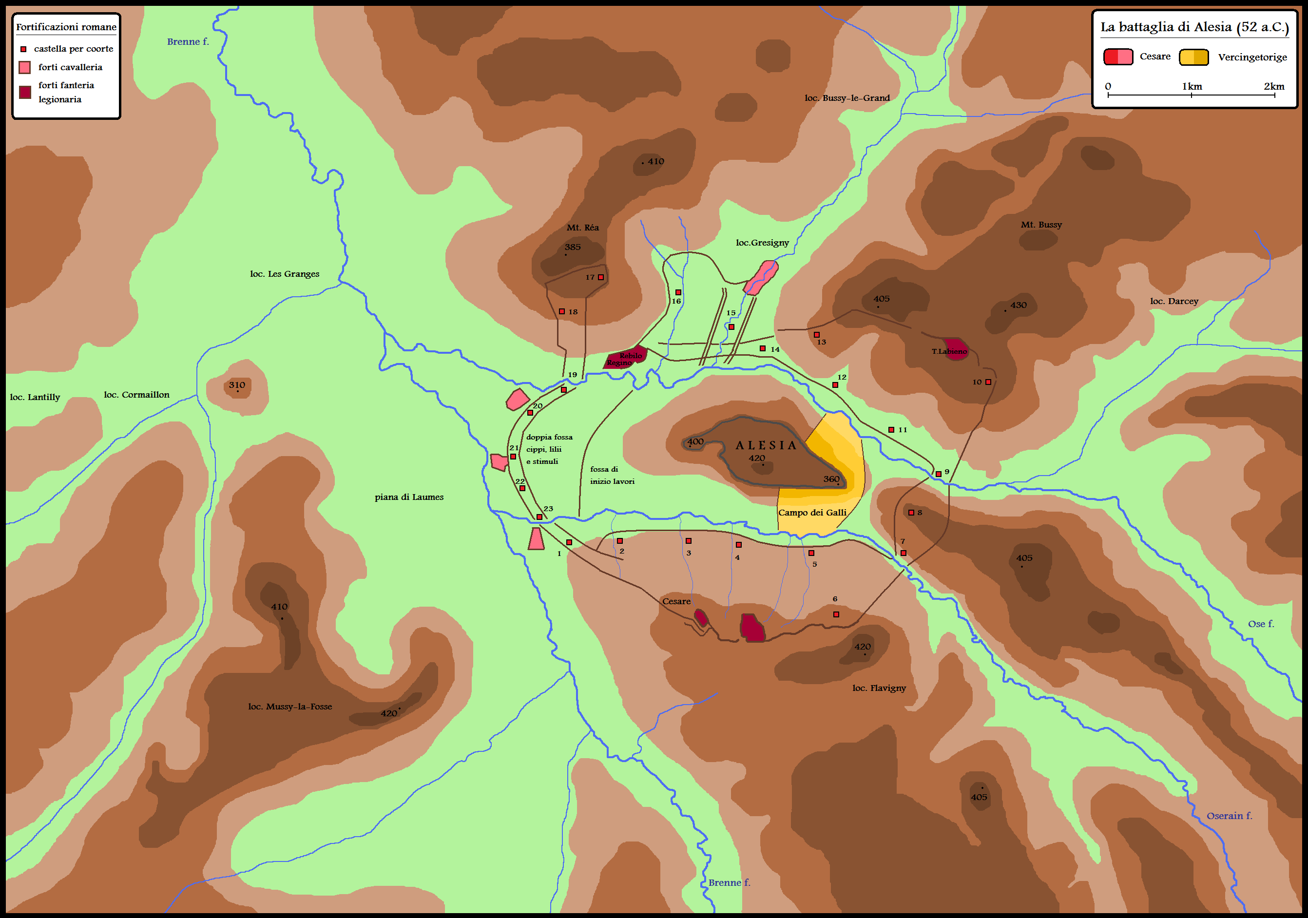 Mappa delle fortificazioni di Cesare ad Alesia del 52 a.C.